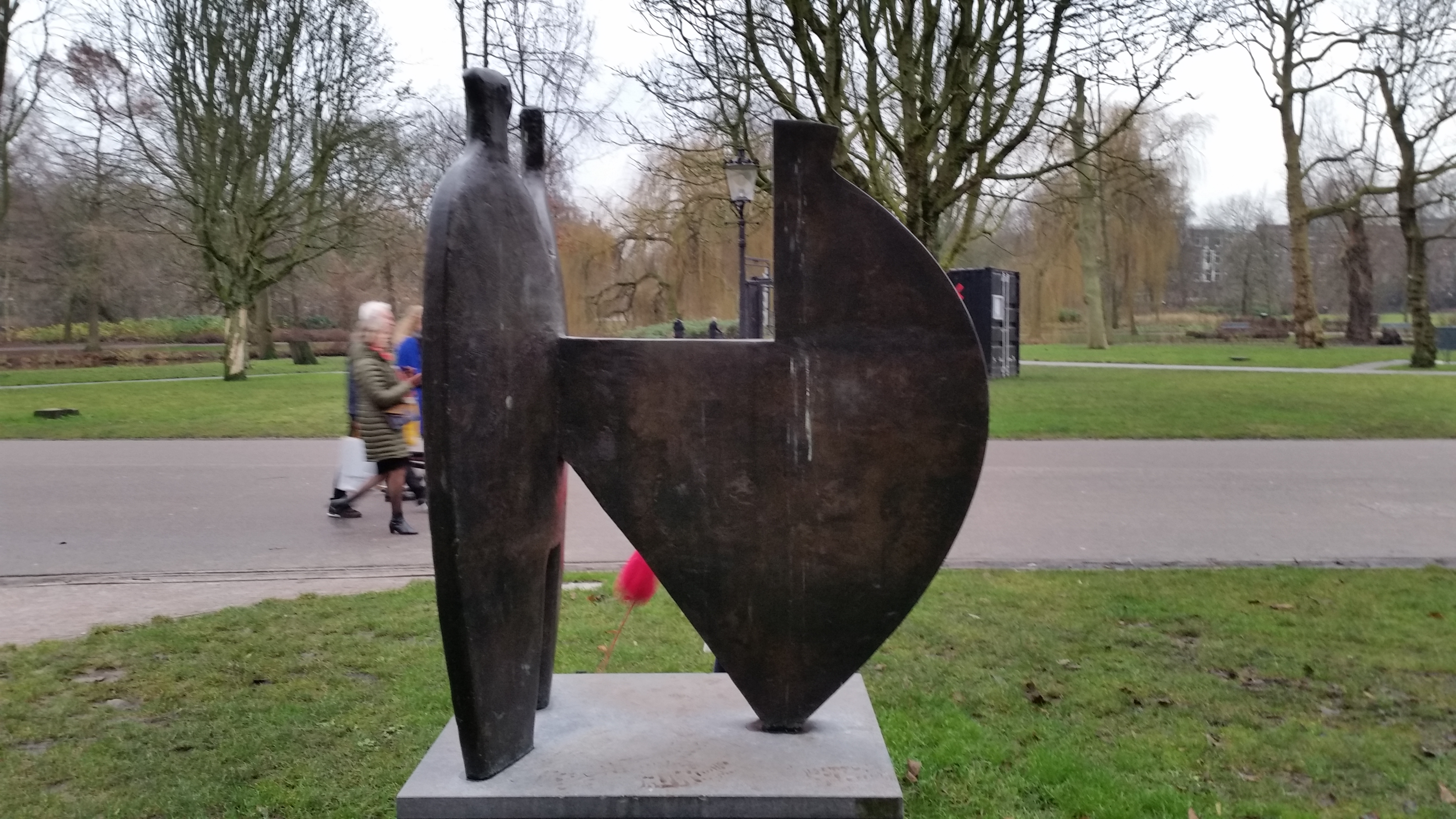 Communicatie van Aart Lamberts in het Oosterpark, december 2019